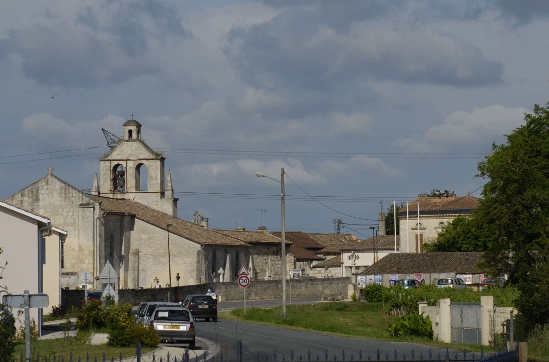 Vue du centre du village d'Aubie-et-Espessas, avec à gauche l'église Saint Martin, au fond le bureau de poste et à droite la mairie.